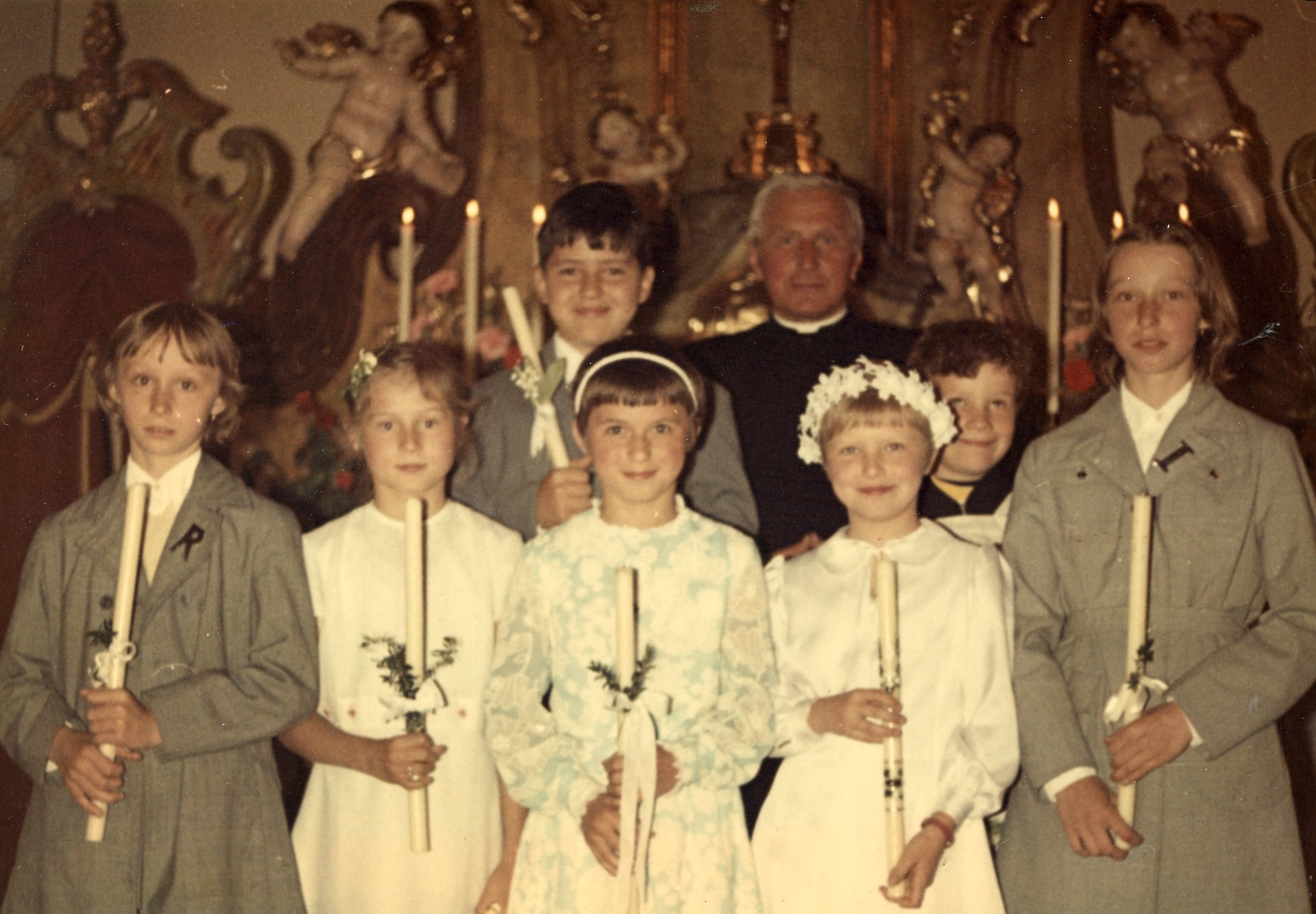 Otec Jan Machač při svatém přijímání